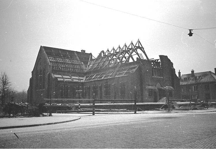 Sloop van de Duinoordkerk in Den Haag voor de aanleg van de Atlantikwall